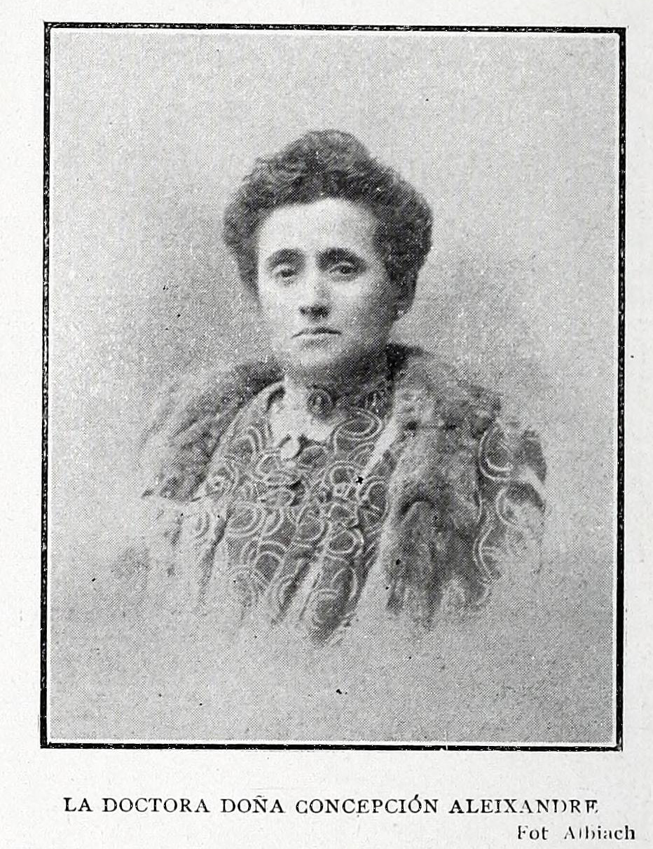 La doctora doña Concepción Aleixandre.